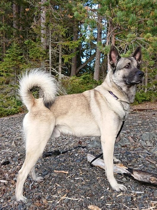 Hedehund